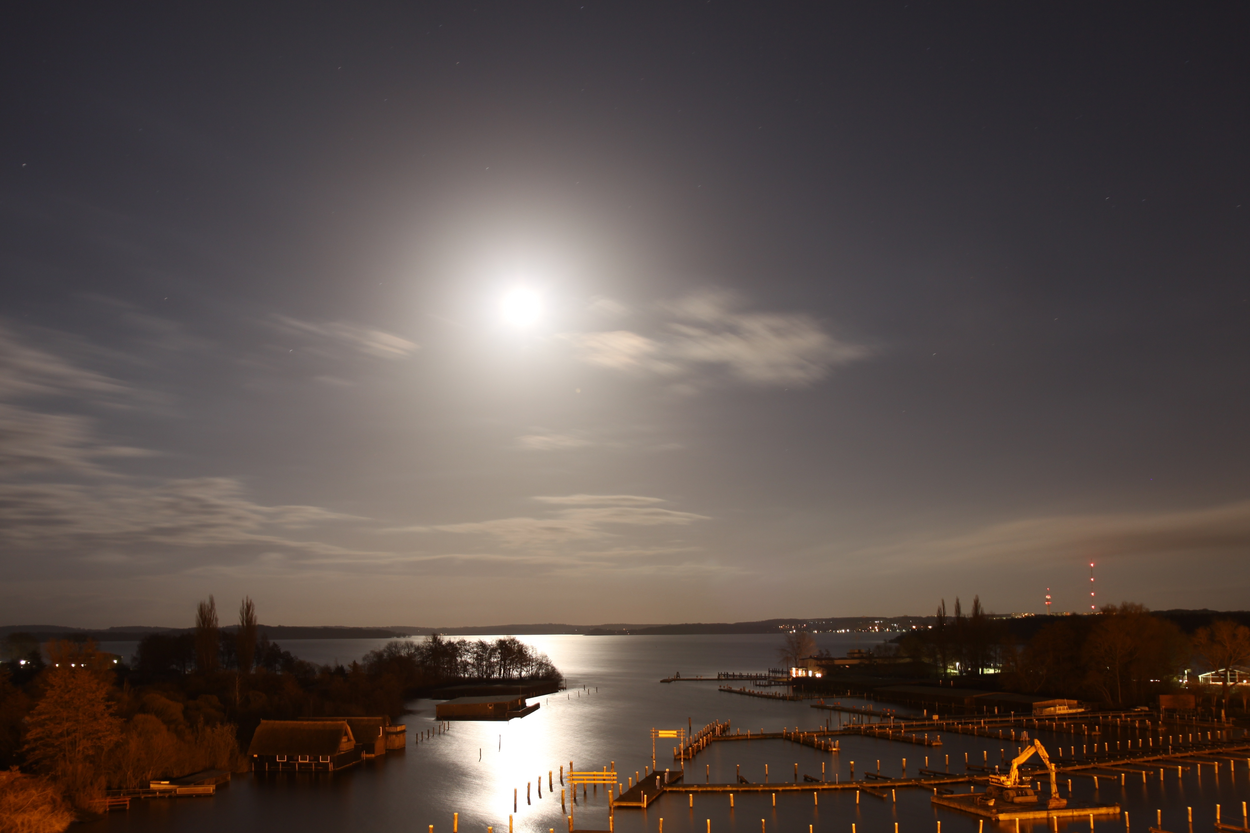 Schwerin, Deutschland. Blick auf den Stadthafen, Schweriner See im Hintergrund. 30 seconds night shot.